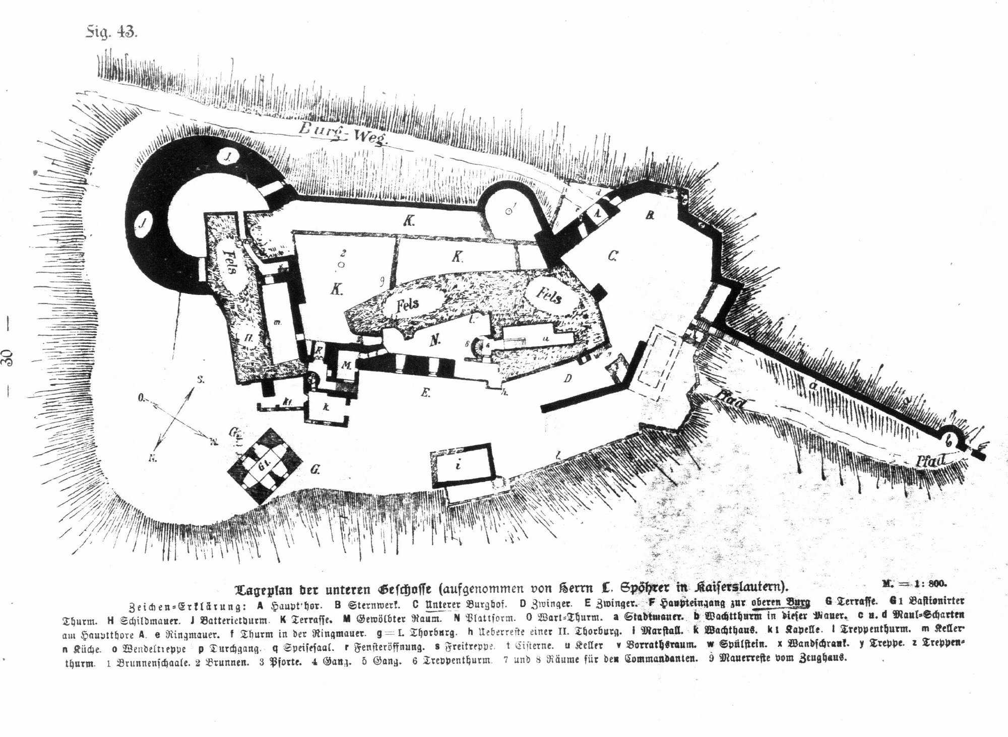 Burg Nanstein, Lageplan von 1889.